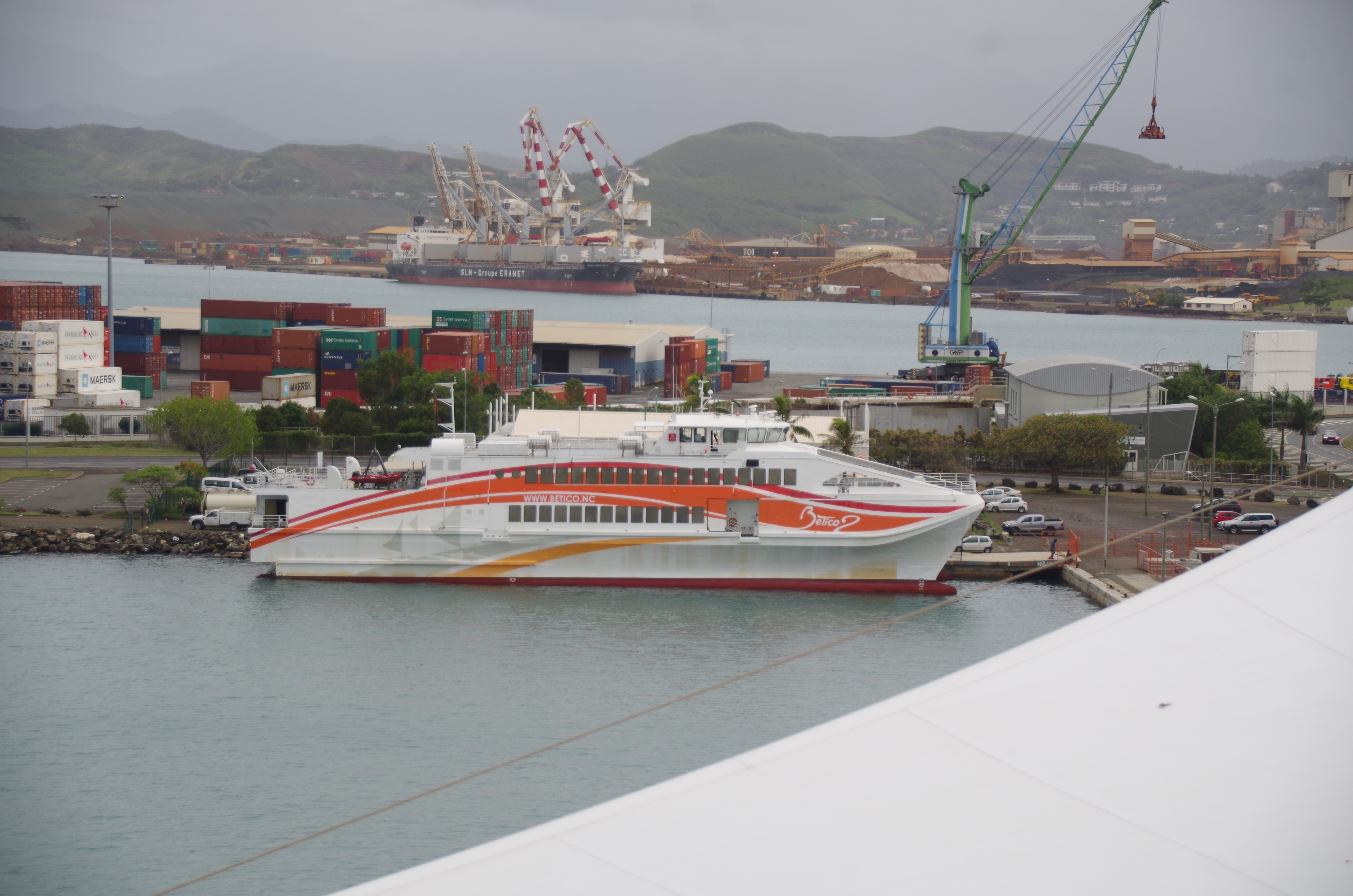 Nouméa Blick zur Fähre von Kreuzfahrtschiff